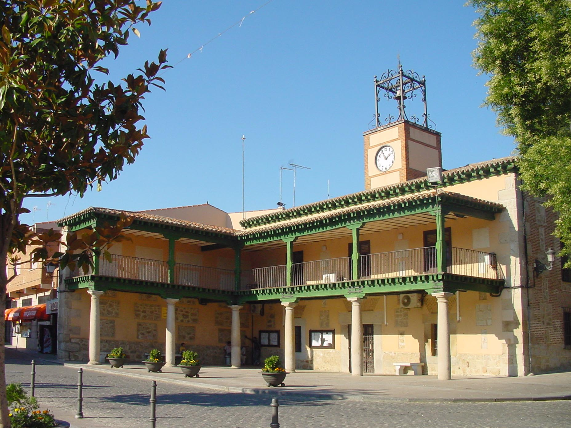 Ayuntamiento de Villa del Prado.